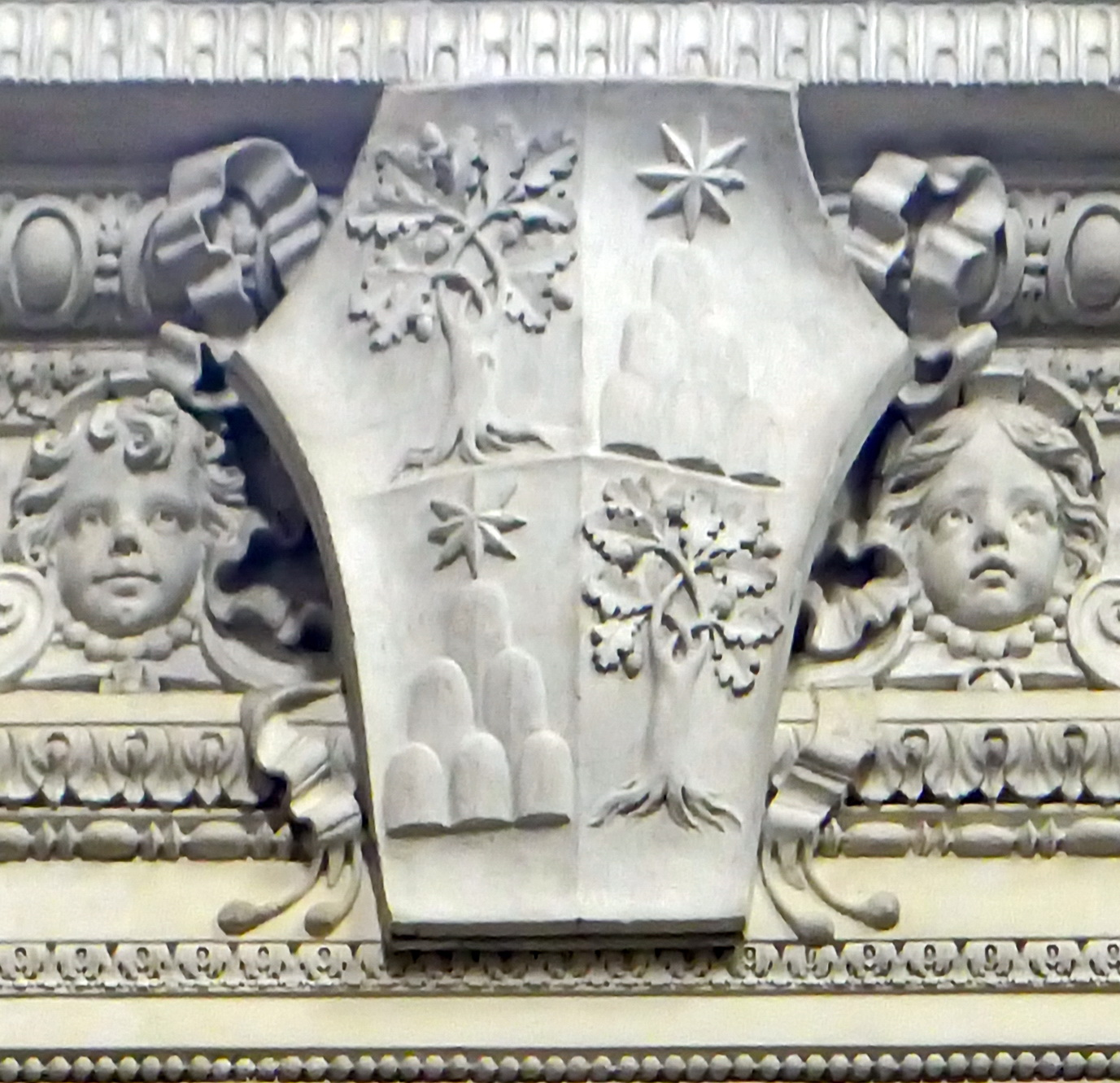 Stemma di Agostino Chigi